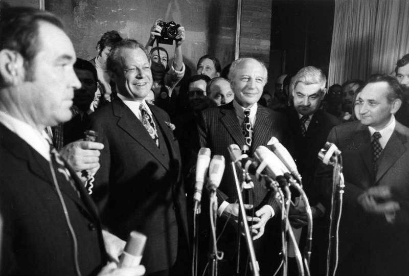 Bundestagswahl 19.11.1972 Als Wahlsieger geben Bundeskanzler Willy Brandt und Bundesminister Walter Scheel gegen 22.20 Uhr im Kanzler-Bungalow eine erste Erklärung ab.